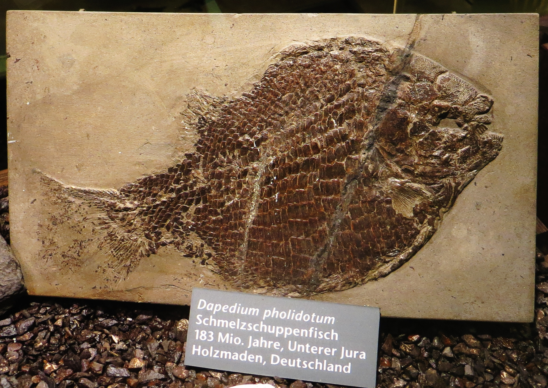 Took the picture at Senckenberg Museum, Frankfurt